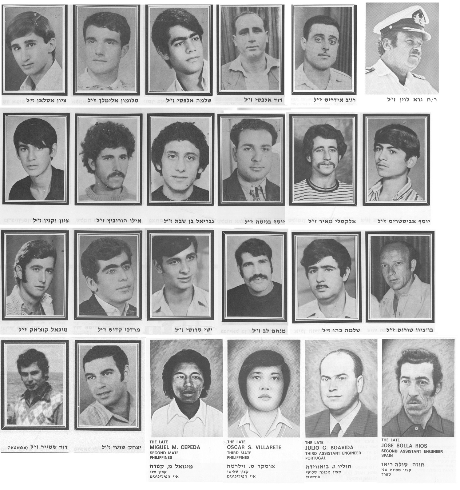 לוח הנצחת אנשי א/מ מצדה שטבעו